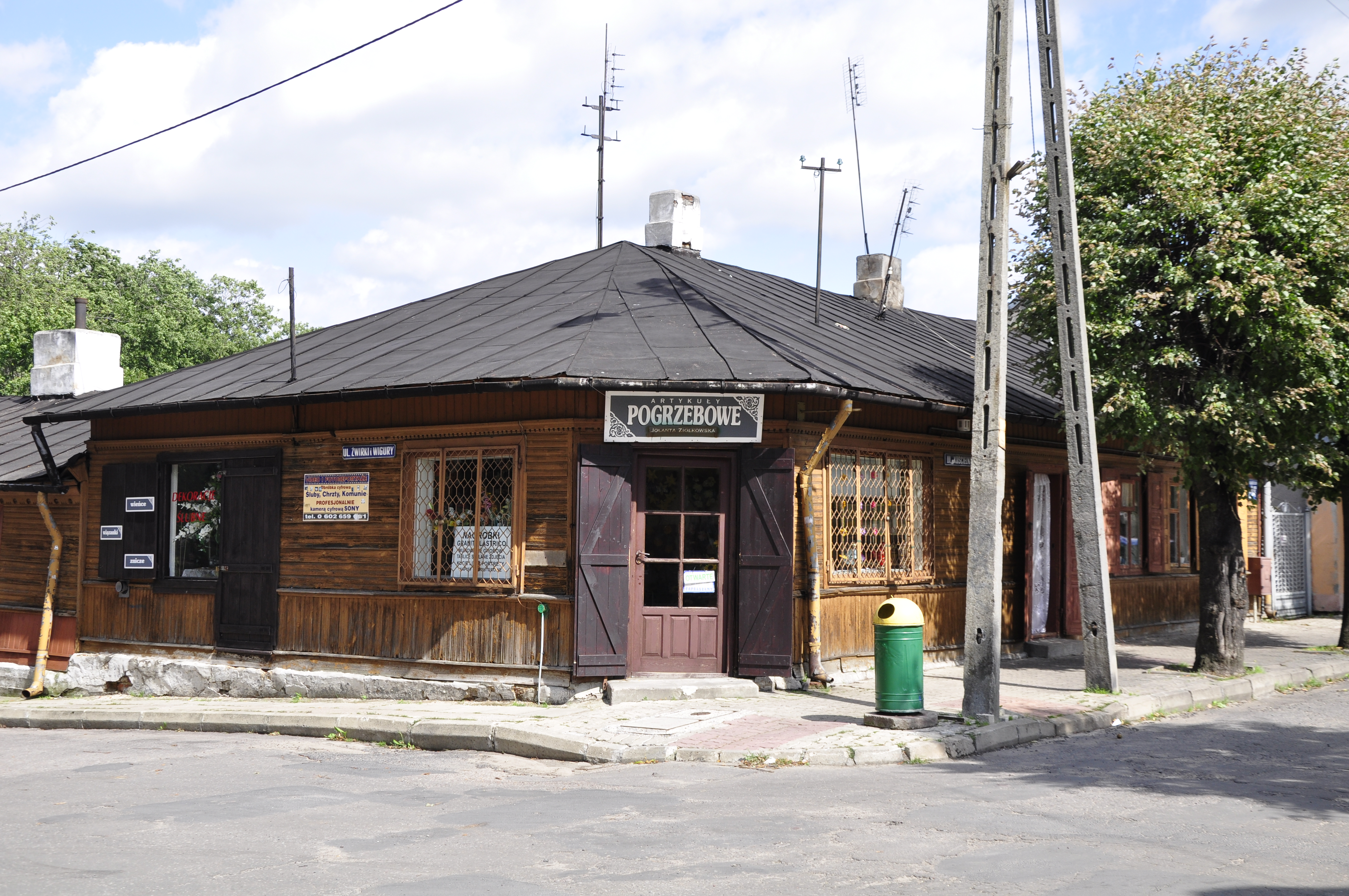 Beerdigungszubehoer, Nasielsk, bei Kirche, Polen